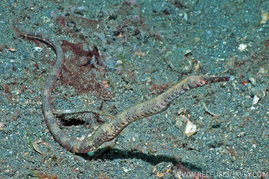 Trachyrhamphus bicoarctatus, en Lembeh Strait, Sulawesi del Norte, Indonesia